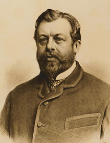 Zikmund II. Berchtold z Uherčic (1834 - 1900), Rakouský šlechtic a politik.